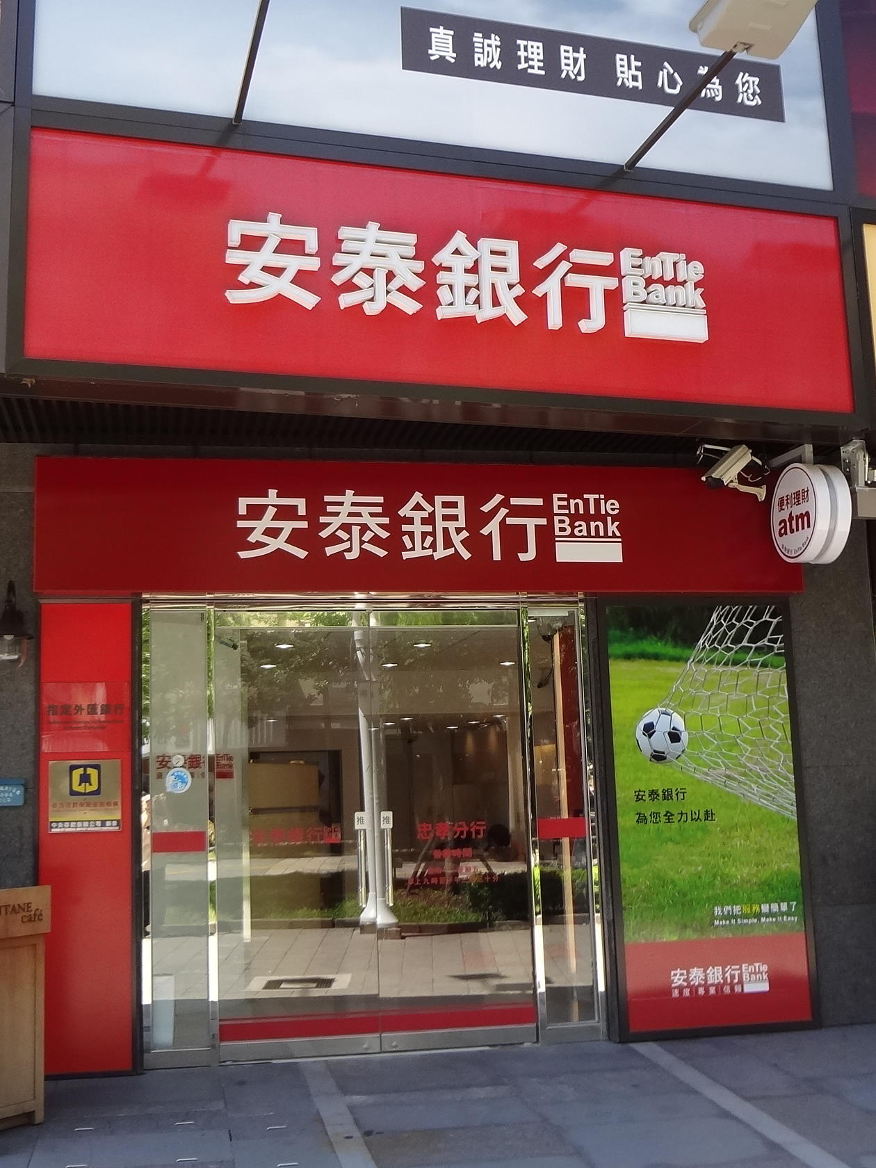 安泰商業銀行忠孝分行，位於臺北市大安區光復南路290巷28號1樓，2018年1月重訪時已歇業。